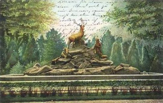 Hubertusbrunnen, Berlin, Großer Tiergarten (Berlin), (destroyed)